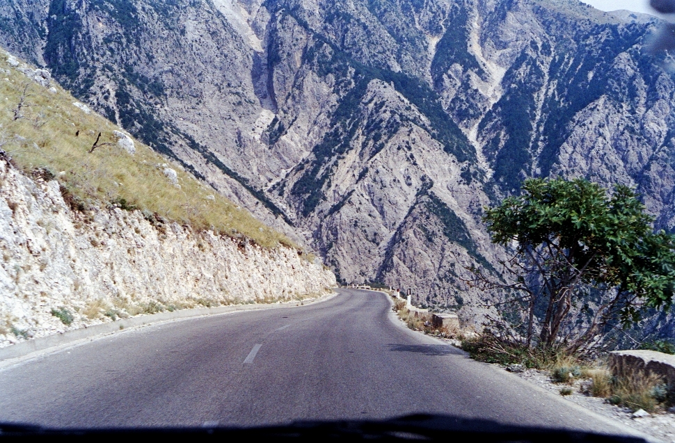 Llogara pass, Albania